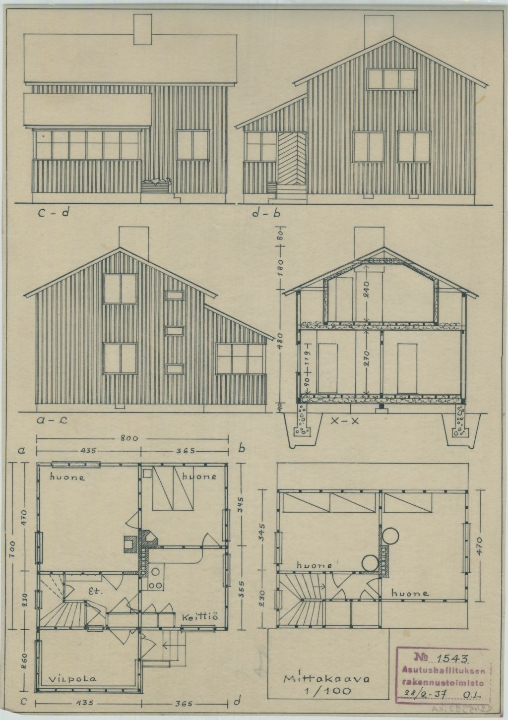 Asutushallituksen tyyppi "Er.As.tyyppi no 4" vuodelta 1937